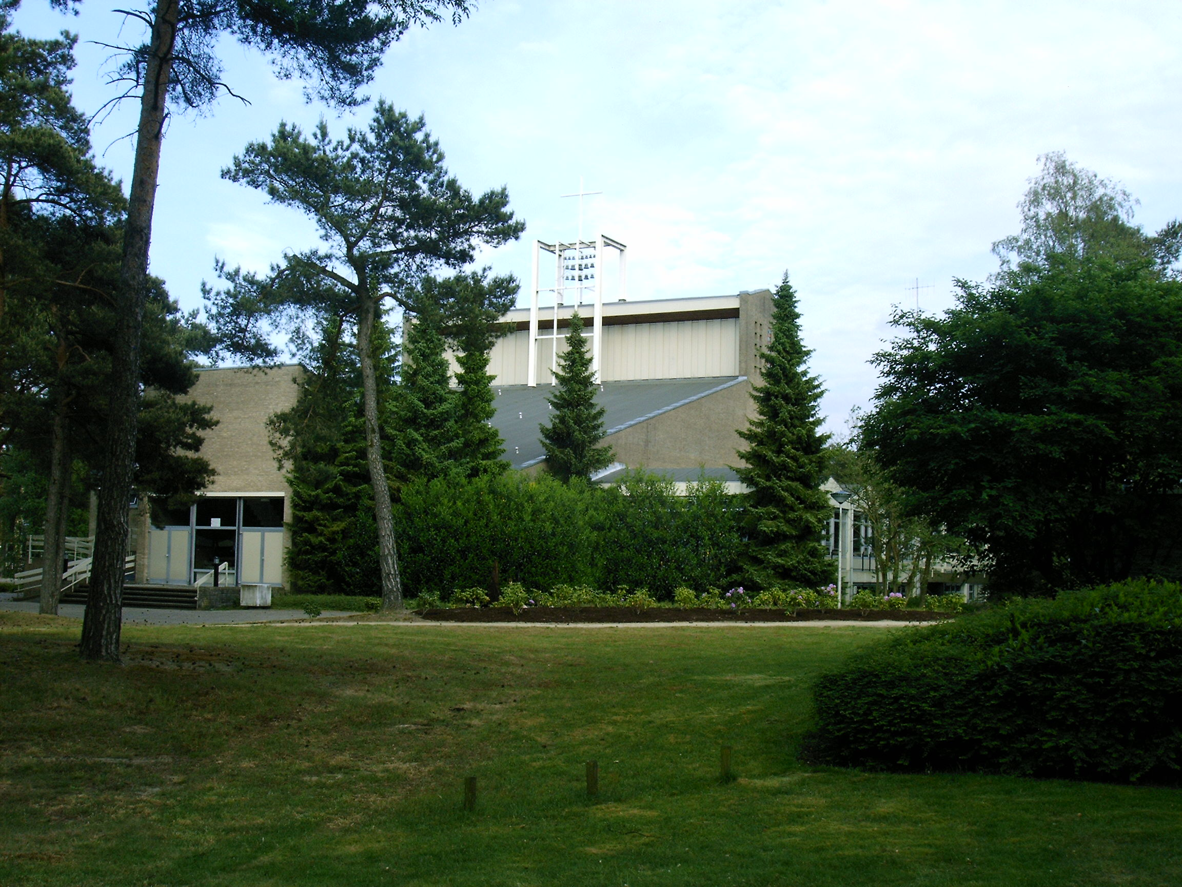 's Heerenloo, De kerk op de hartenberg